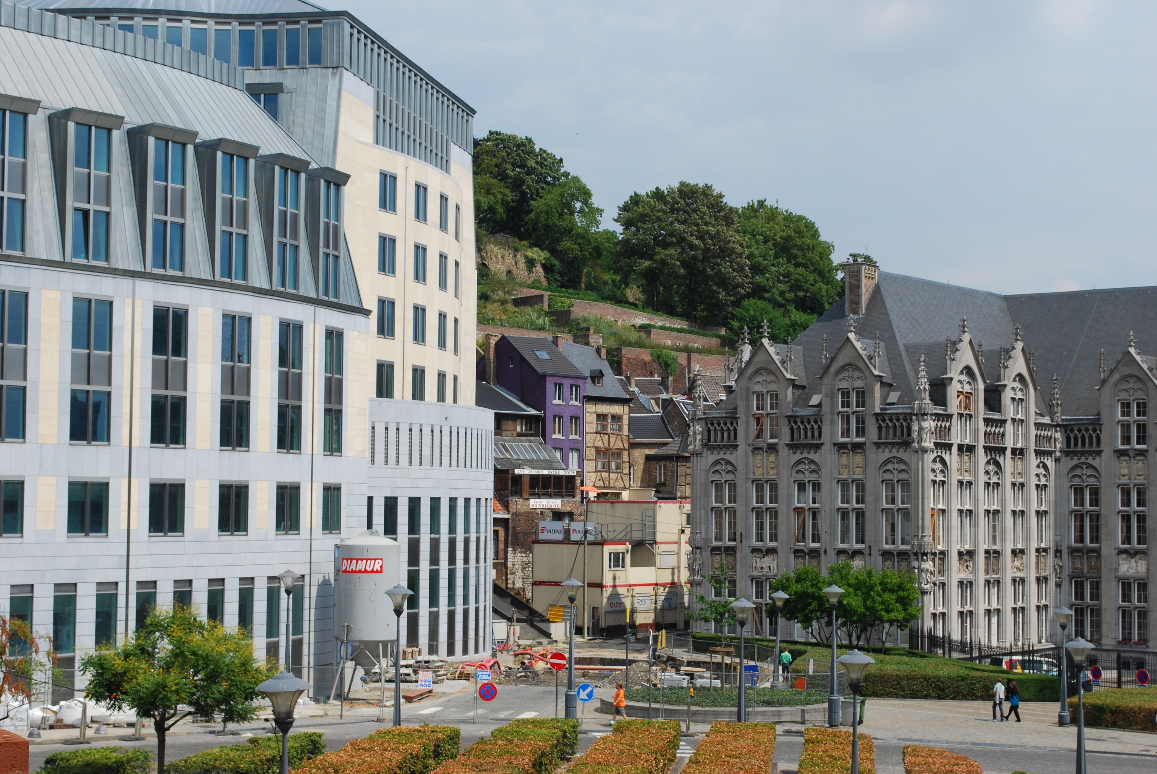 La place Notger à Liège : les bâtiments du Ministère de la Justice et le Palais Provincial.